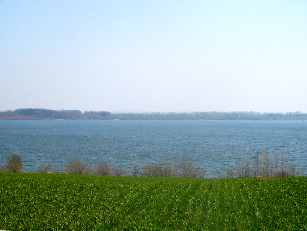 Zbiornik retencyjny wody pitnej Słup na południe od Legnicy